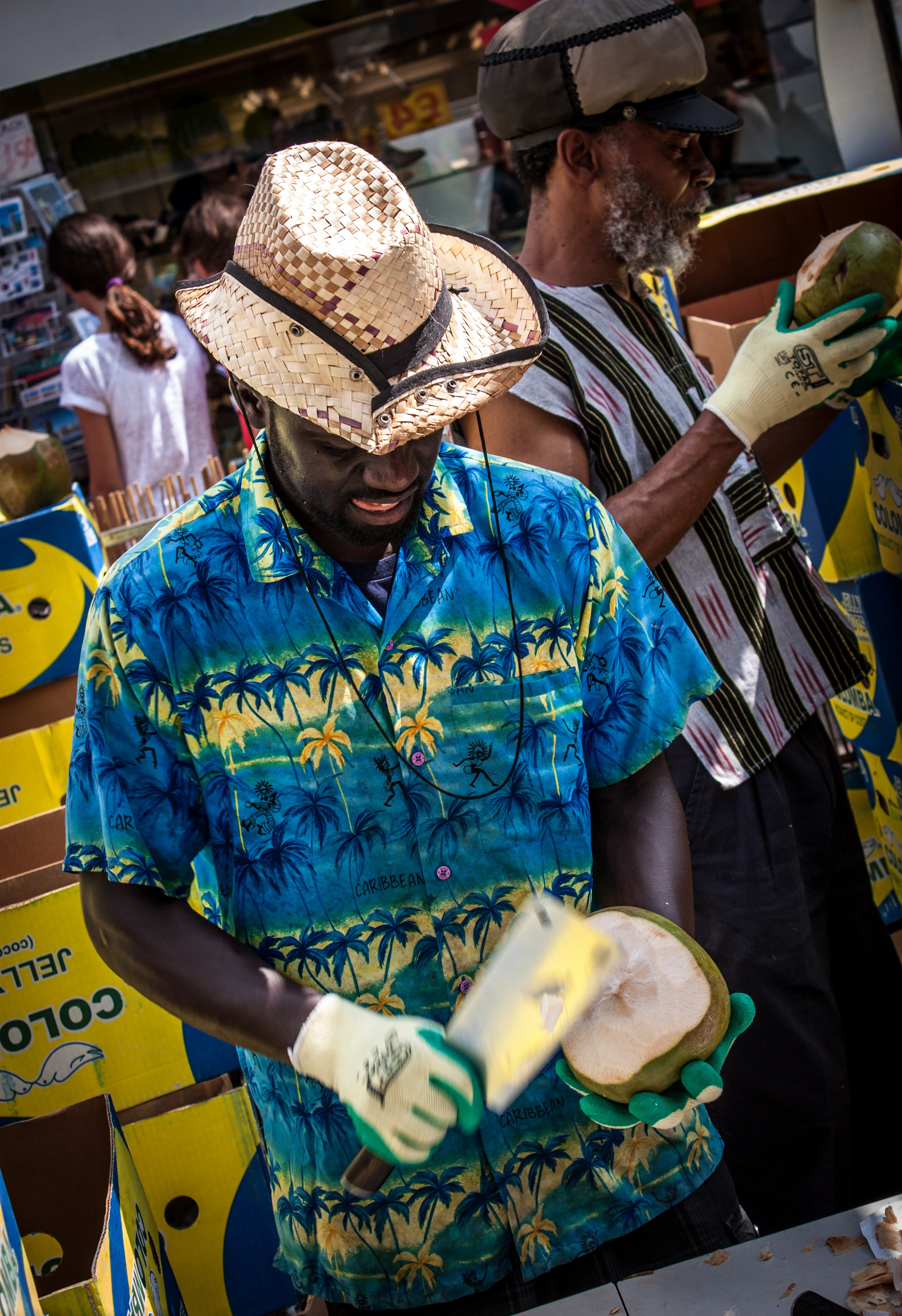 London2013